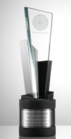 KUKA Award